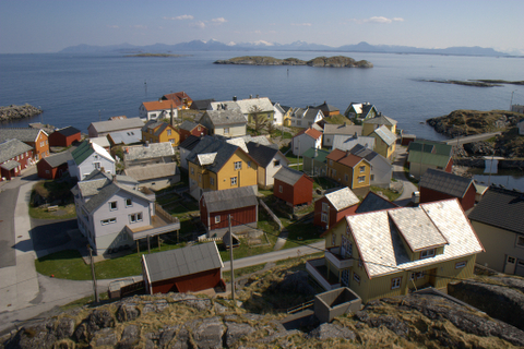 Fiskeværet Ona sett fra fyret på Onakalven